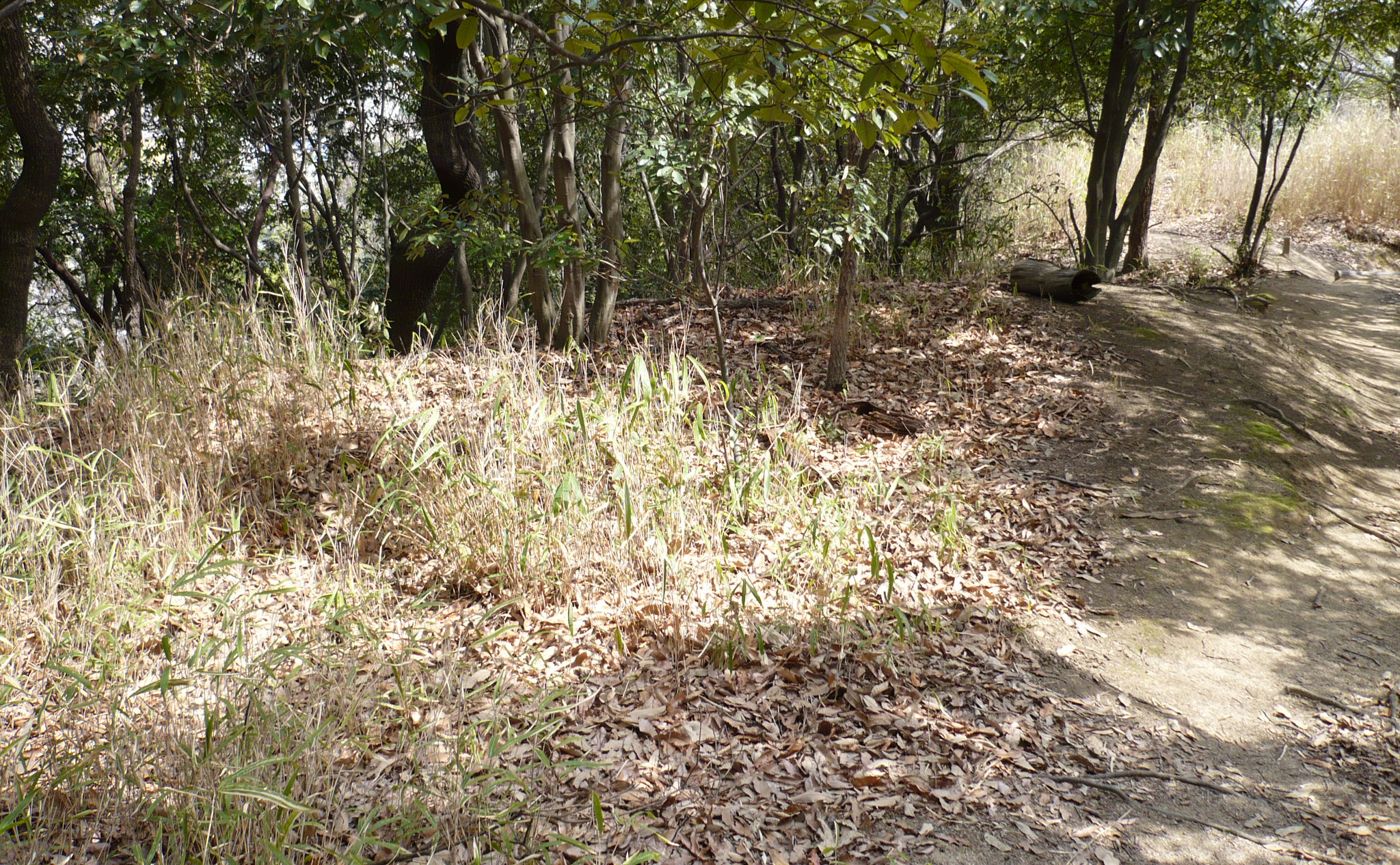 東曲輪